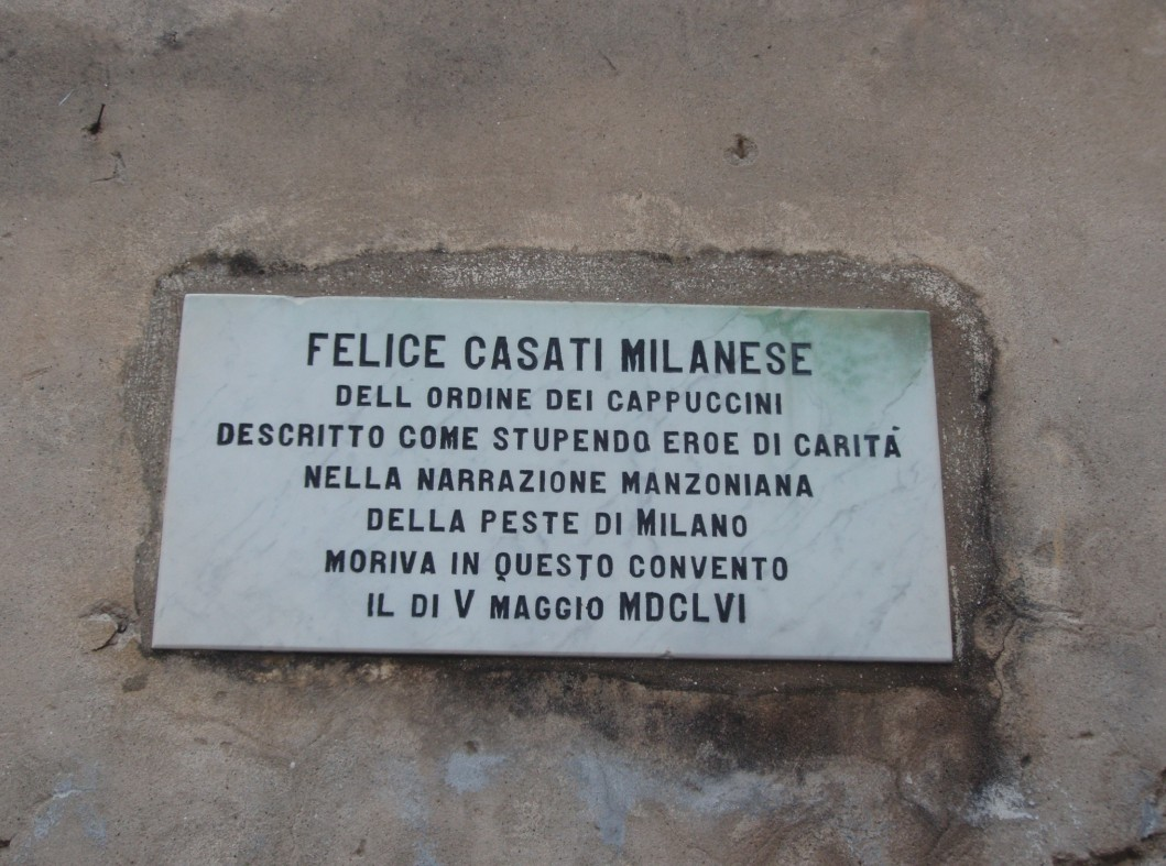 Lapide dedicata a padre Felice Casati, morto il 5 maggio 1656 nel convento dei Frati Cappuccini a Livorno